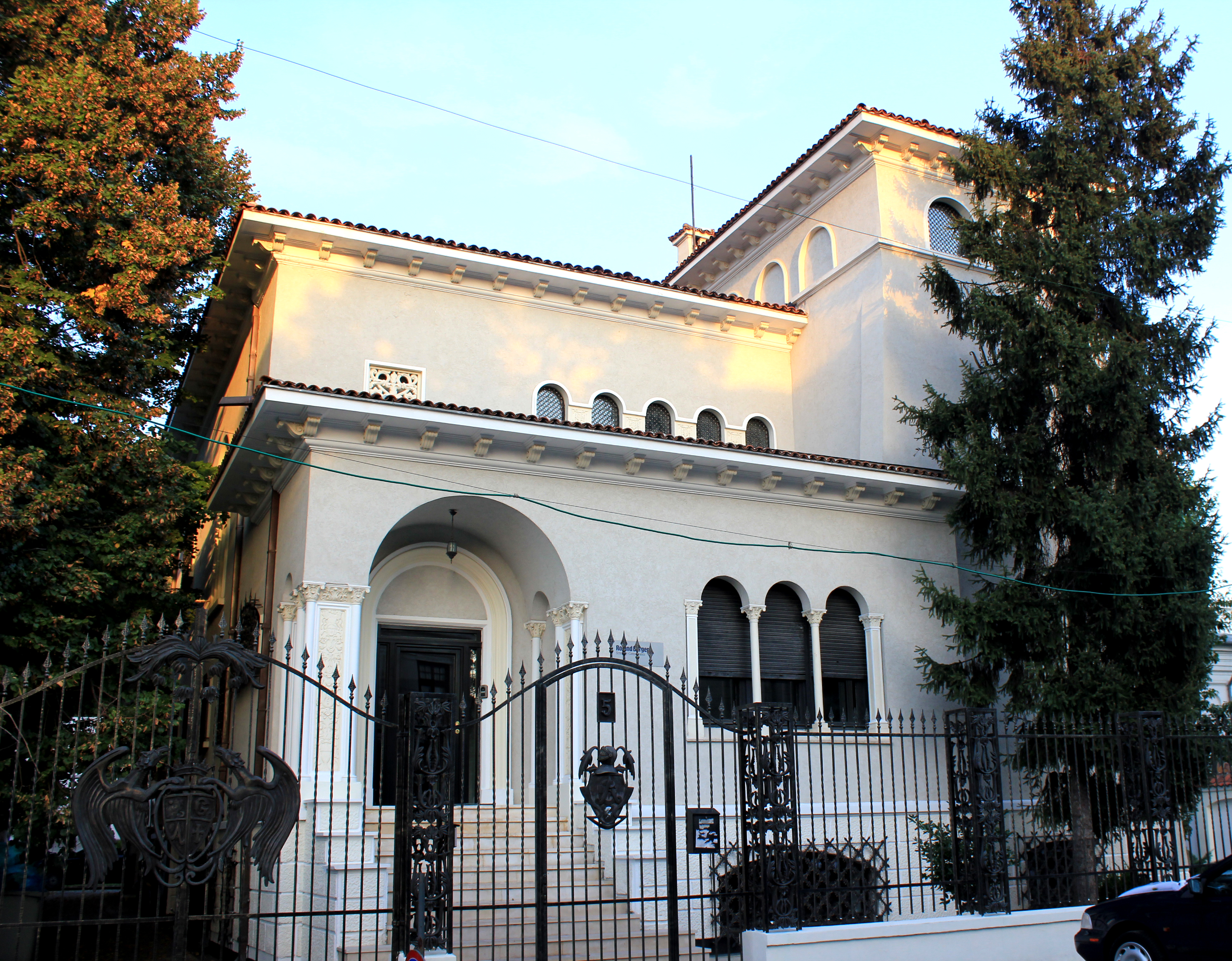 Casă Burghelea 5